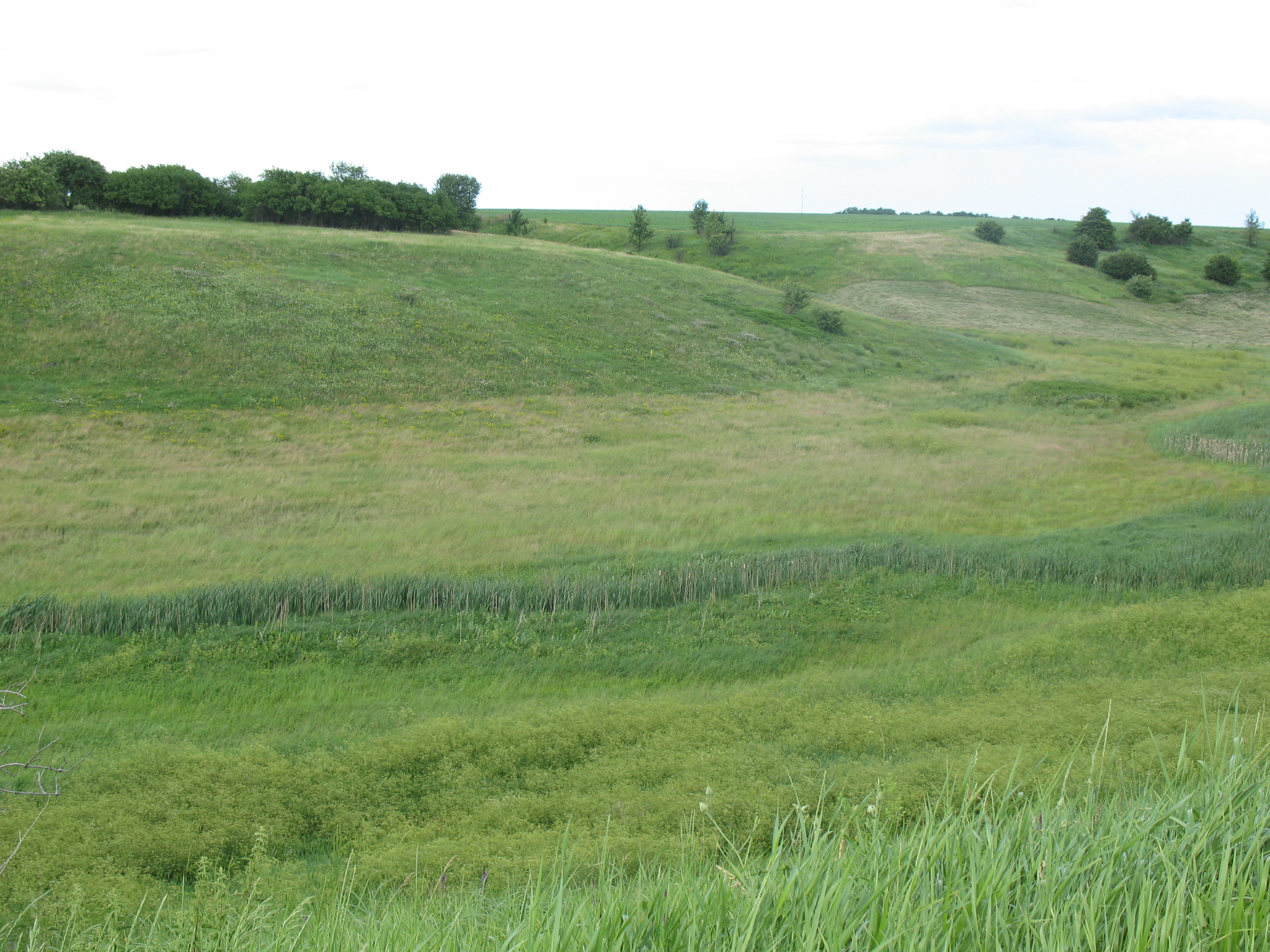 Вид на садиби в Шпирнах